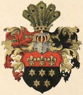 Ewersi suguvõsa aadlivapp